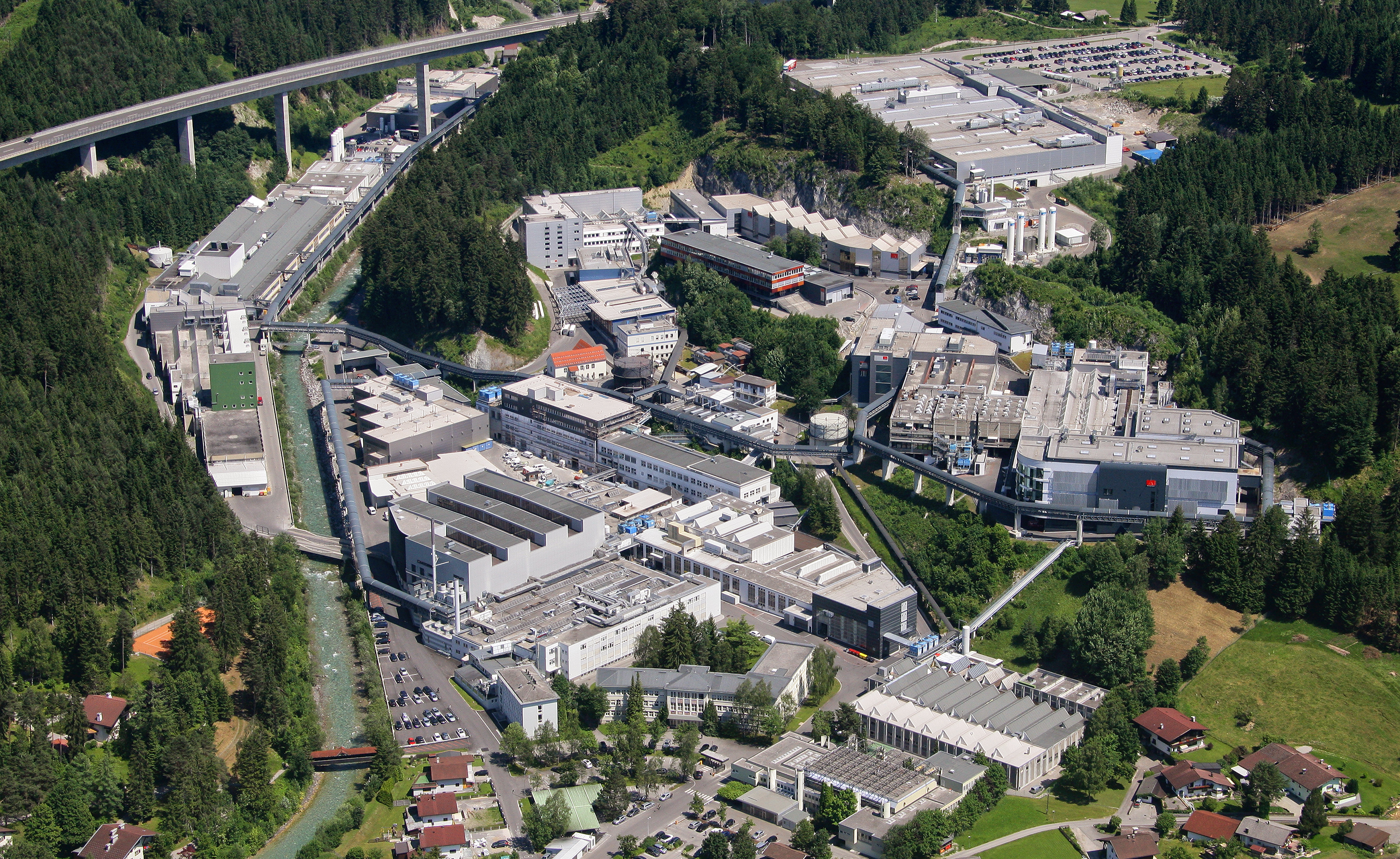 Plansee Headquarters in Austria